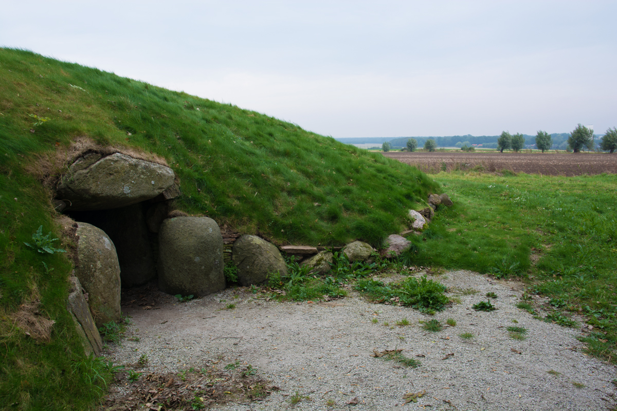 Gillhög